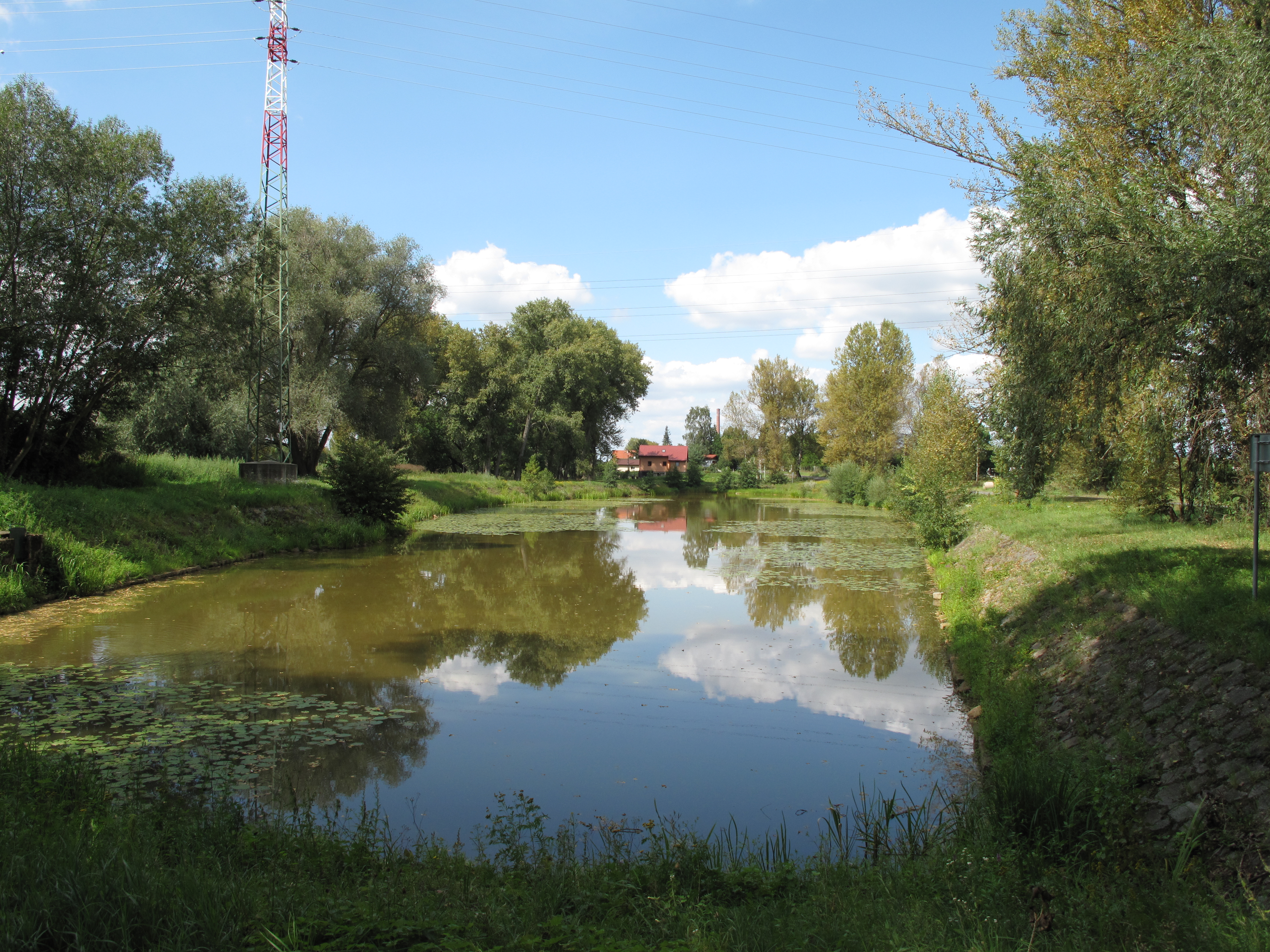 Vodní nádrž Laguna (též kalová laguna vodárny Káraný) v Káraném. Okres Klatovy, Česká republika.